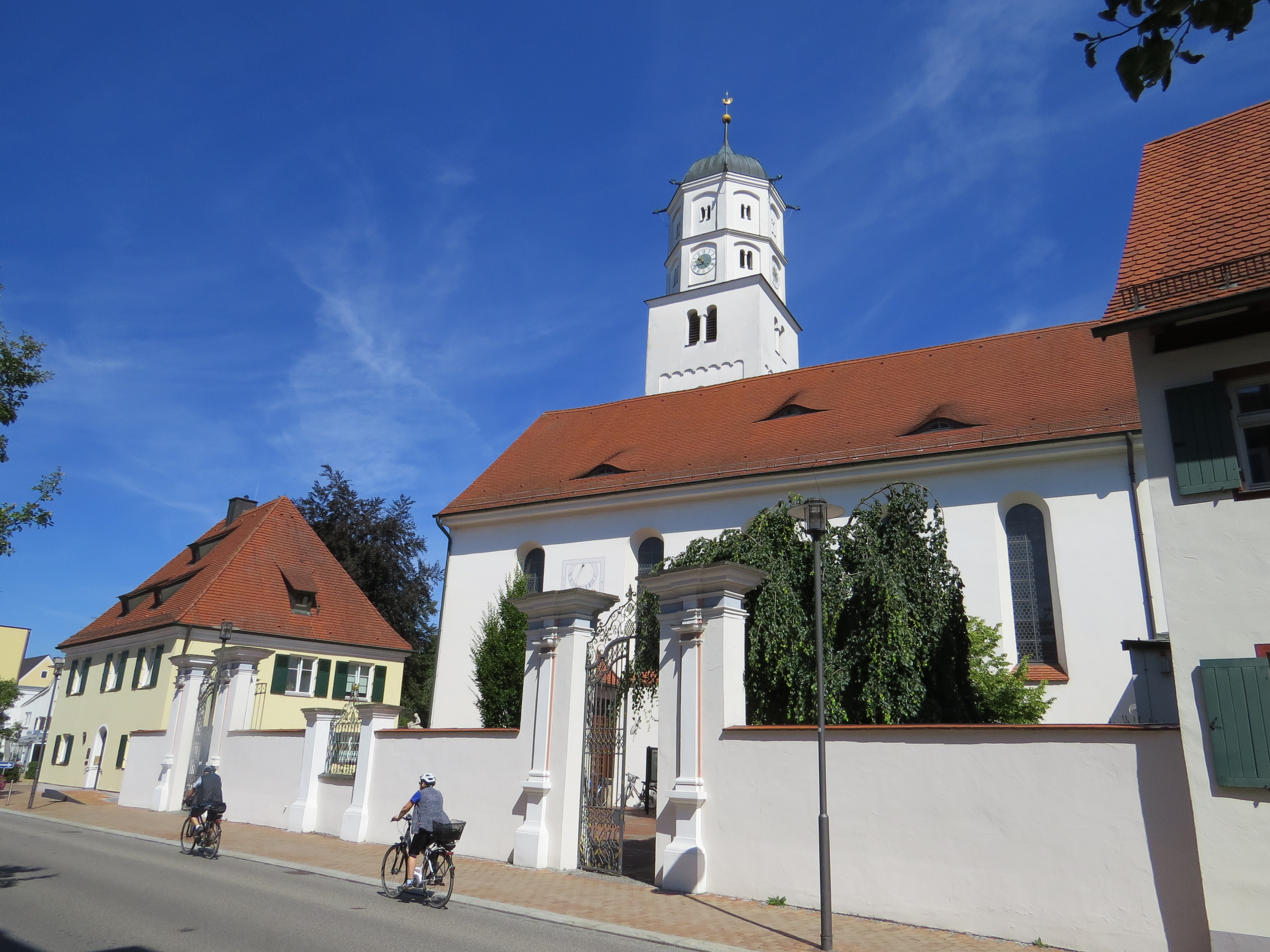 Pfarrkirche St. Martin in Illertissen von Süden